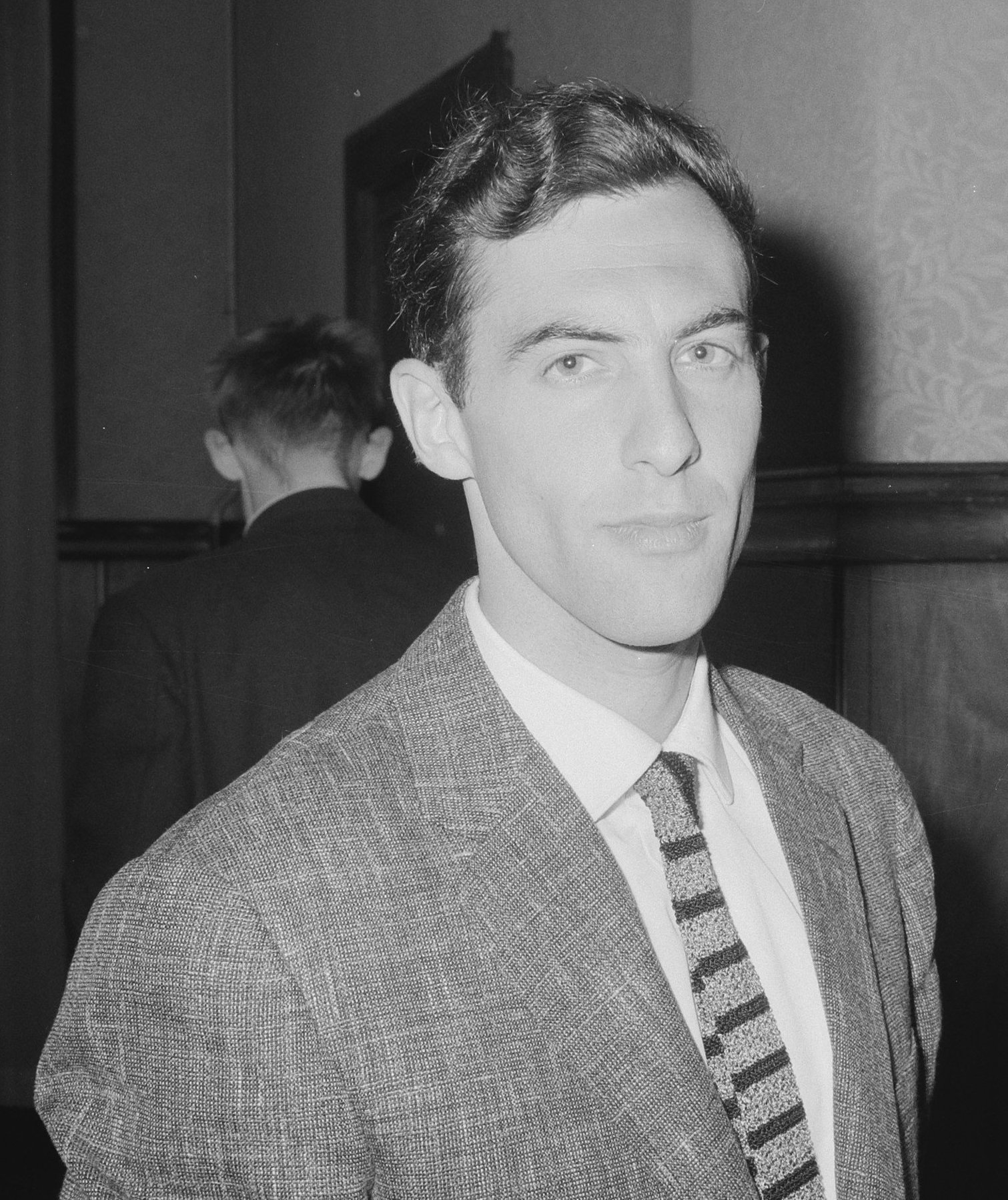 Collectie / Archief : Fotocollectie Anefo Reportage / Serie : [ onbekend ] Beschrijving : Demonstratief Studentencongres in de Kroon te Amsterdam, K. Kolthoff Datum : 19 mei 1964 Locatie : Amsterdam, Noord-Holland Trefwoorden : congressen, demonstraties, studenten Persoonsnaam : Kolthoff, K. Fotograaf : Nijs, Jac. de / Anefo Auteursrechthebbende : Nationaal Archief Materiaalsoort : Negatief (zwart/wit) Nummer archiefinventaris : bekijk toegang 2.24.01.03 Bestanddeelnummer : 916-4496